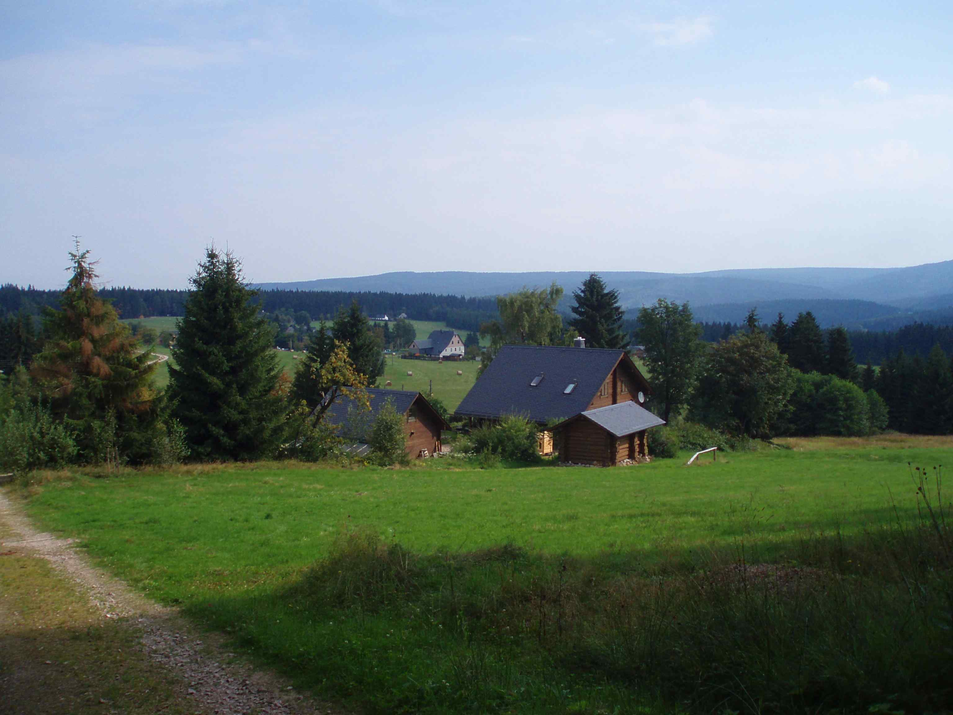 Oberjugel-Südost